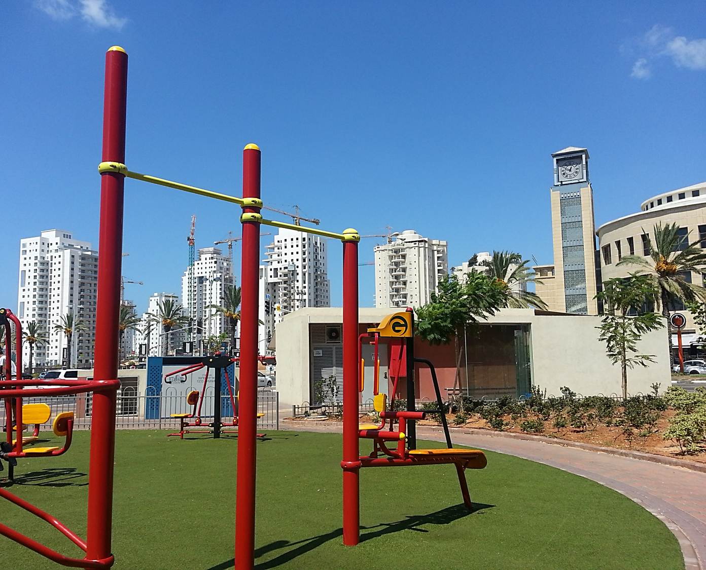 מתחם כושר מול קניון חולון